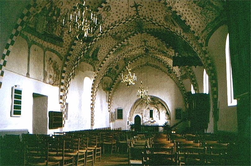 Jetsmark Kirke, kirkerummet set mod øst